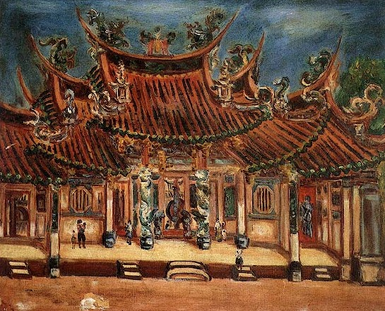 此畫描寫的主題對象很可能是台南市大天后宮，原係明寧靖王朱術桂府邸。寺廟建築鮮艷的紅黑色與天空的湛藍色對比，以及尖翹飛揚的弧形殿脊，表現出寺廟建築的壯麗與喧鬧氣氛。類此借用民間習見的色彩和藝術形式加以個性化的創作方式，正是戰後新一代畫家「本土化」風格的來源之一。(by 李賢輝)